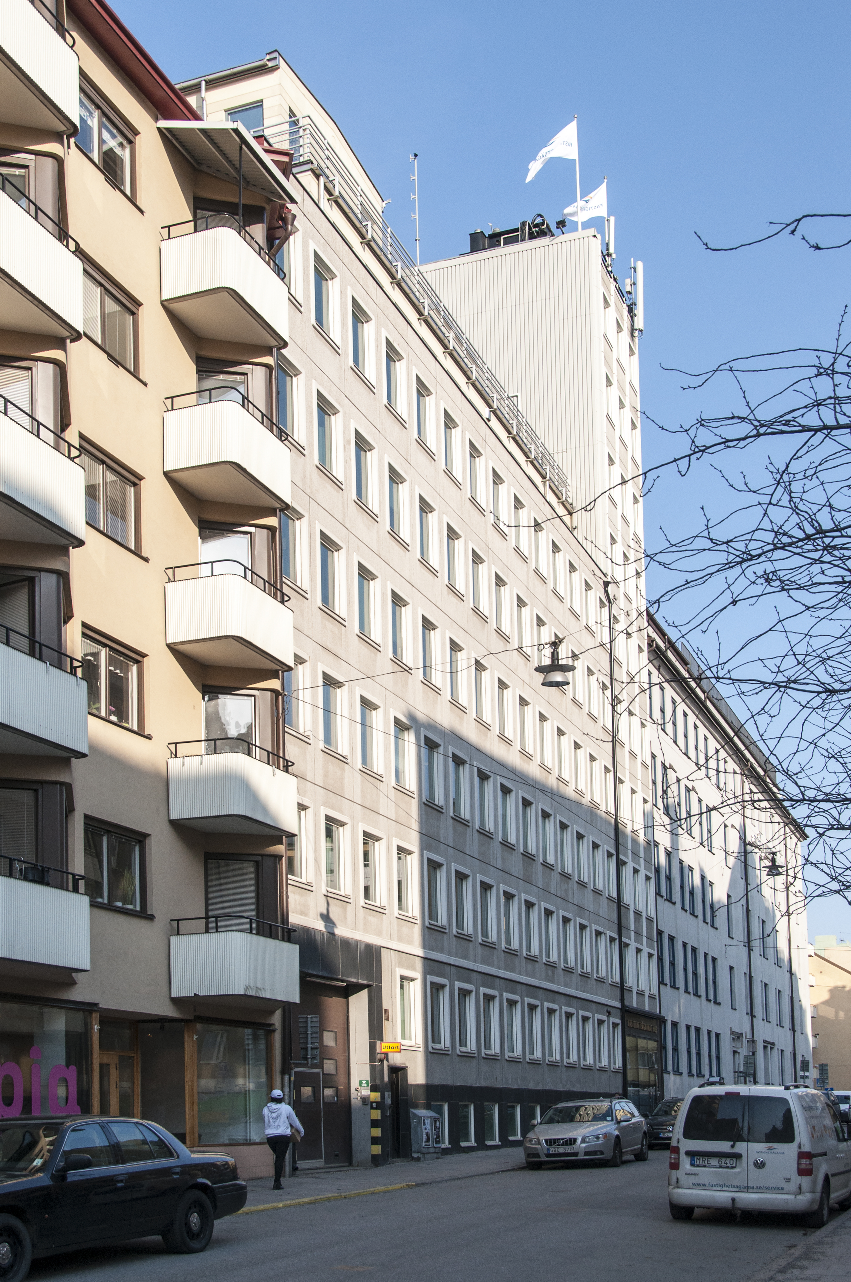 Skutan 37, Alströmergatan 14, Nybyggnadsår 1954 - 1957, AB Skånska Cementgjuteriet (Byggmästare) Svenska Radio AB (Byggherre) Ture Wennerholm (Arkitekt)